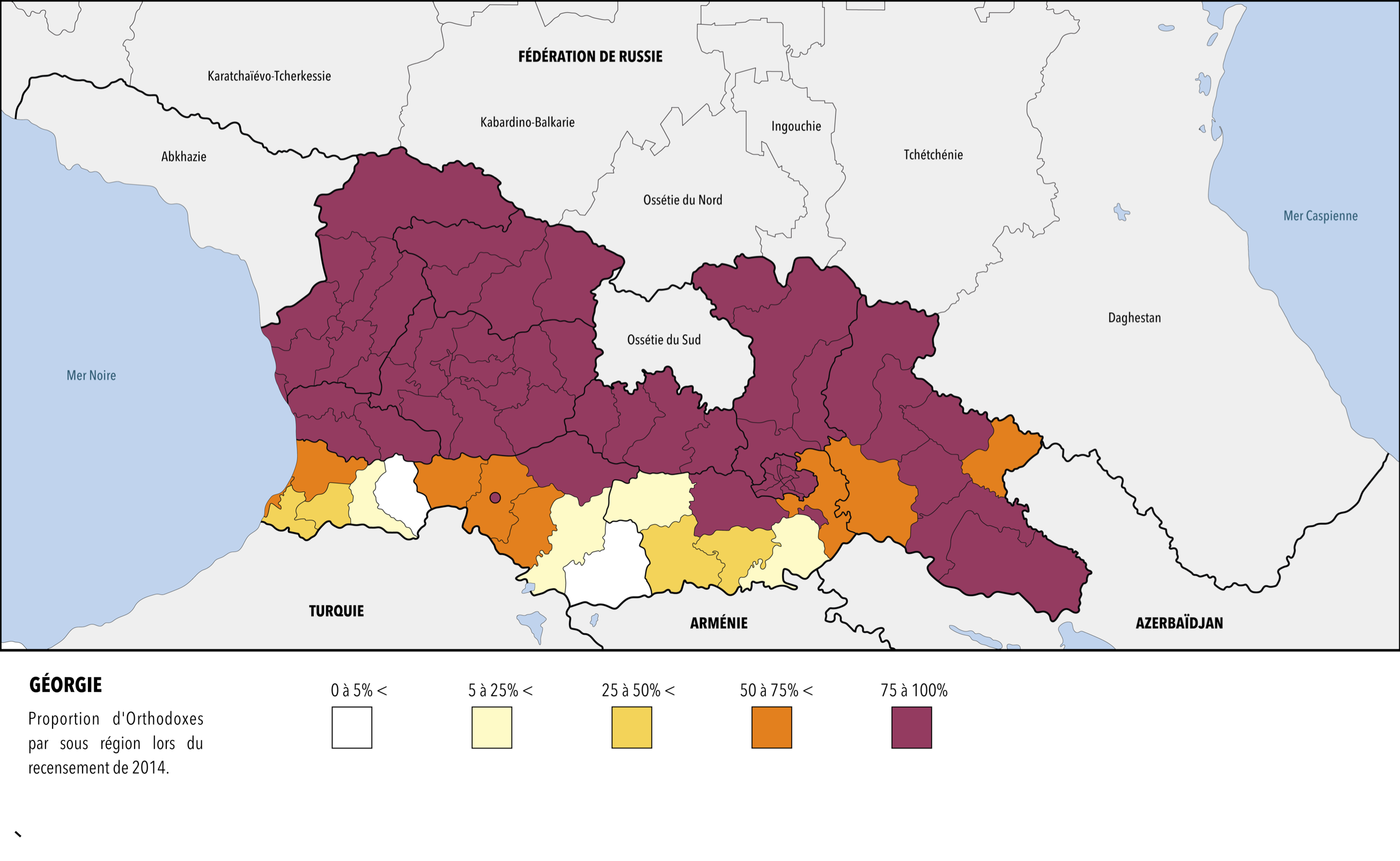 Géorgie : proportions d'Orthodoxes par sous région lors du recensement de 2014.